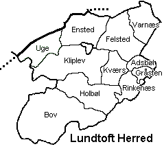 Lundtoft Herred, Aabenraa Amt, Danmark.